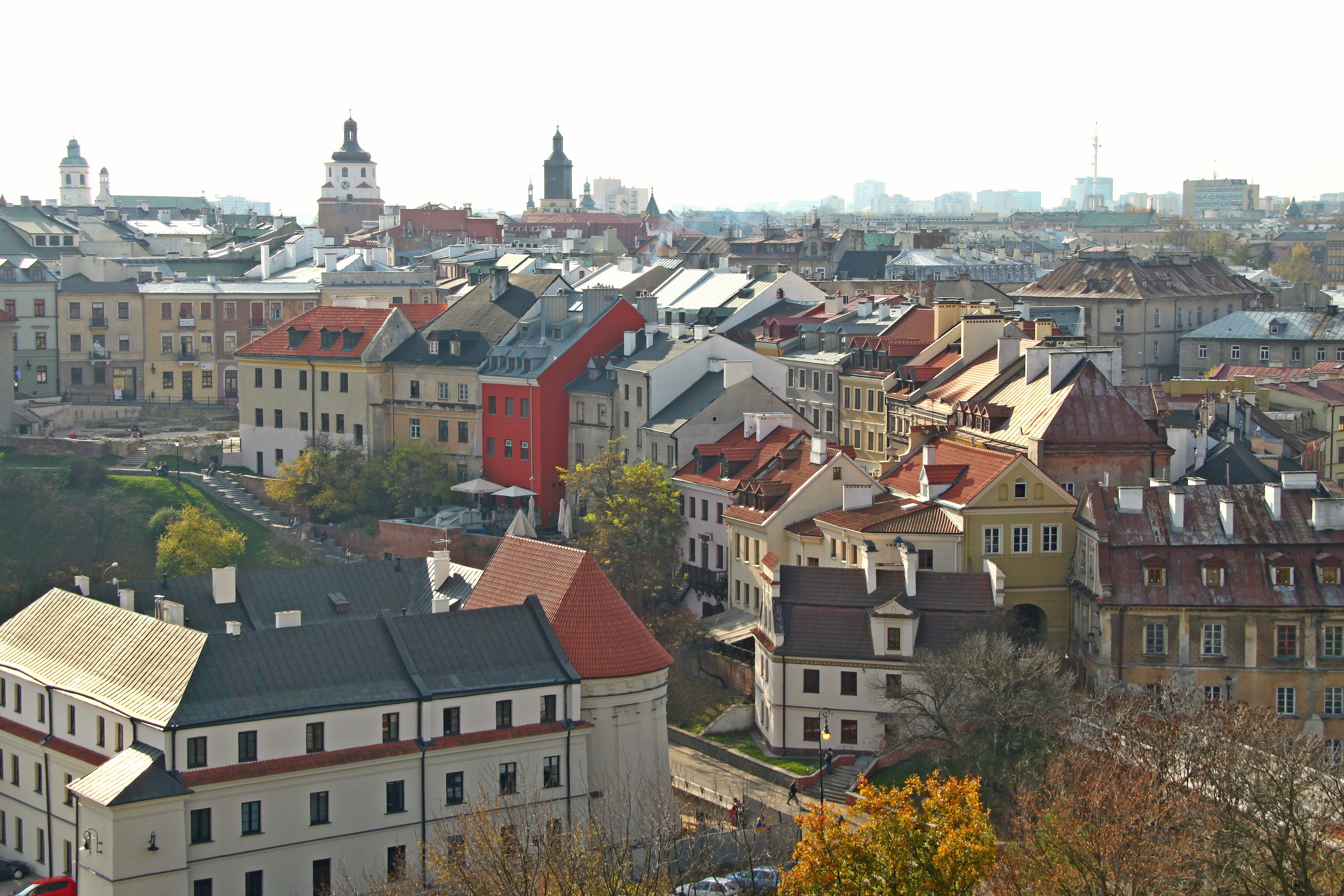 Lublin, układ urbanistyczny Starego Miatra i śródmieścia